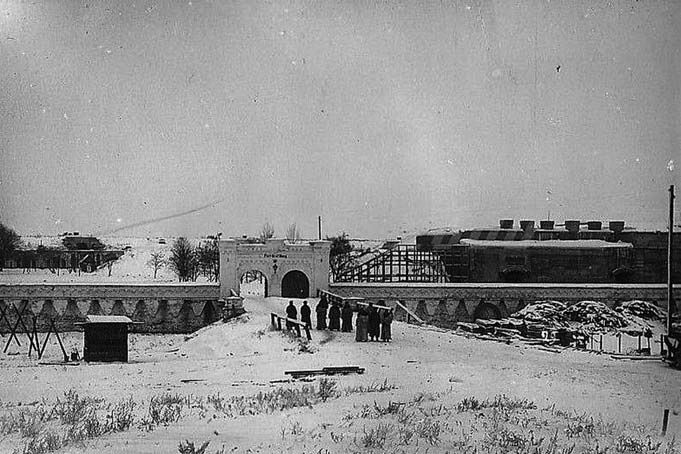 Фотография входа в форт начало ХХ в.